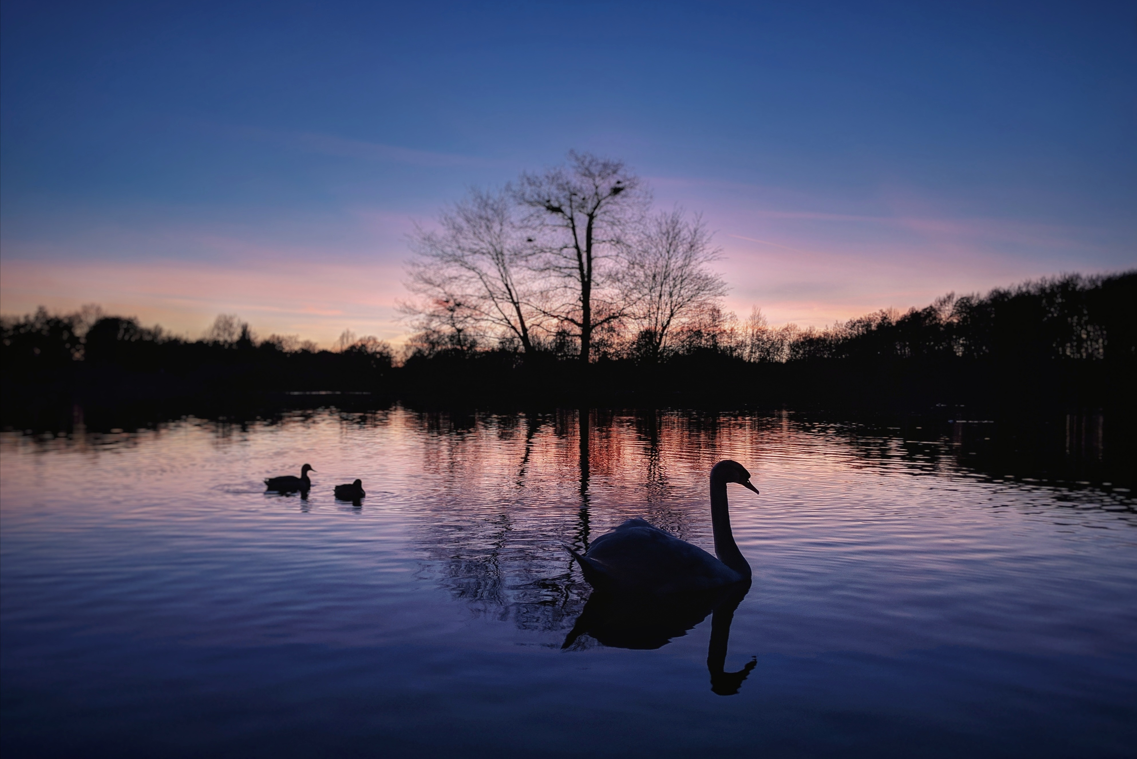 Zu sehen der Rotbachsee in Dinslaken mit Insel, zugehörig dem Naturschutzgebiet Hiesfelder Wald.